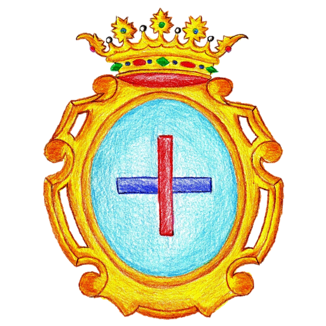 Escudo de la Hermandad del Cautivo de Cazalla de la Sierra